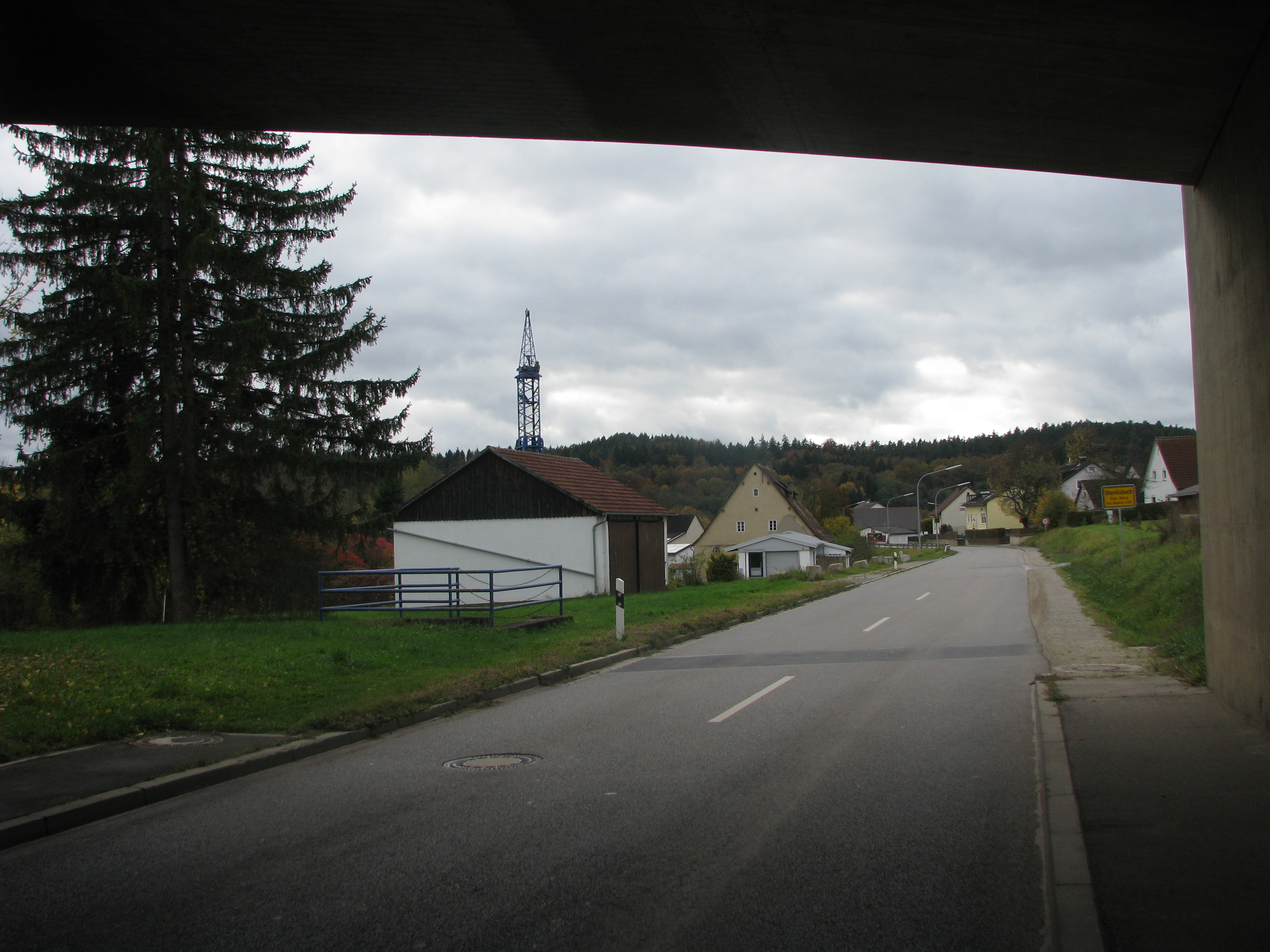 Oberölsbach, Ortsteil der Gemeinde Berg in der Oberpfalz, Bayern, Blick aus der A 3-Unterführung auf den Ort